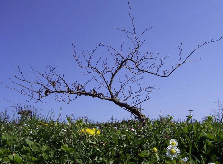 10 Jahre alte Süntelbuche (Fagus sylvatica 'Tortuosa') in Bad Münder am Deister, Deutschland